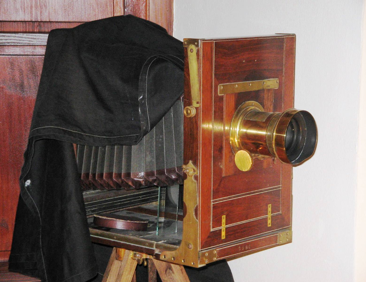 Old studio camera Alter Studio Fotoapparat Quelle: eigene Aufnahme am 21. Sept. 2005 Fotograf: Janez Novak, Ljubljana, Slovenija